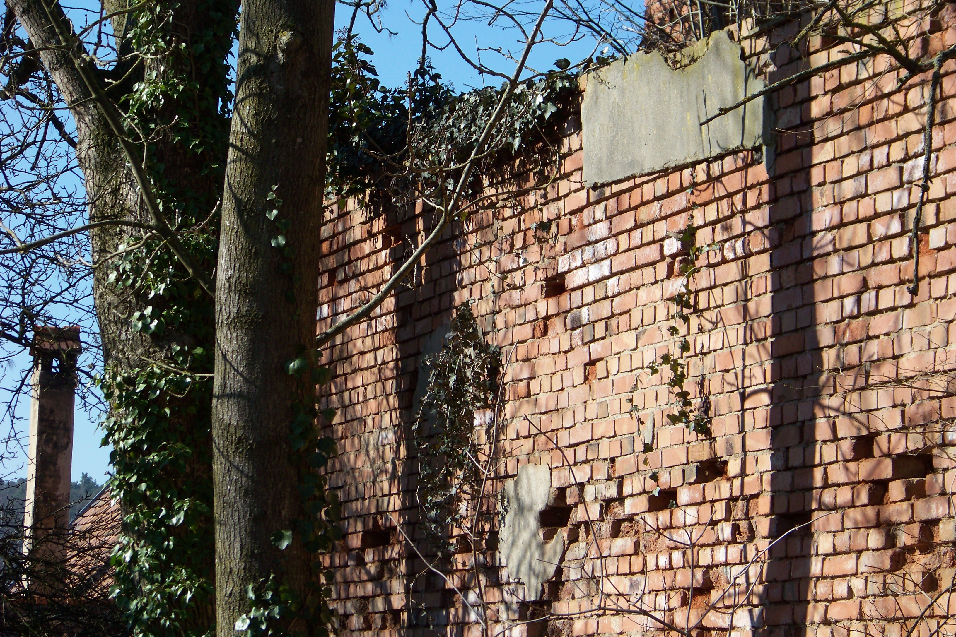 Alte Scheune in Bonnhof